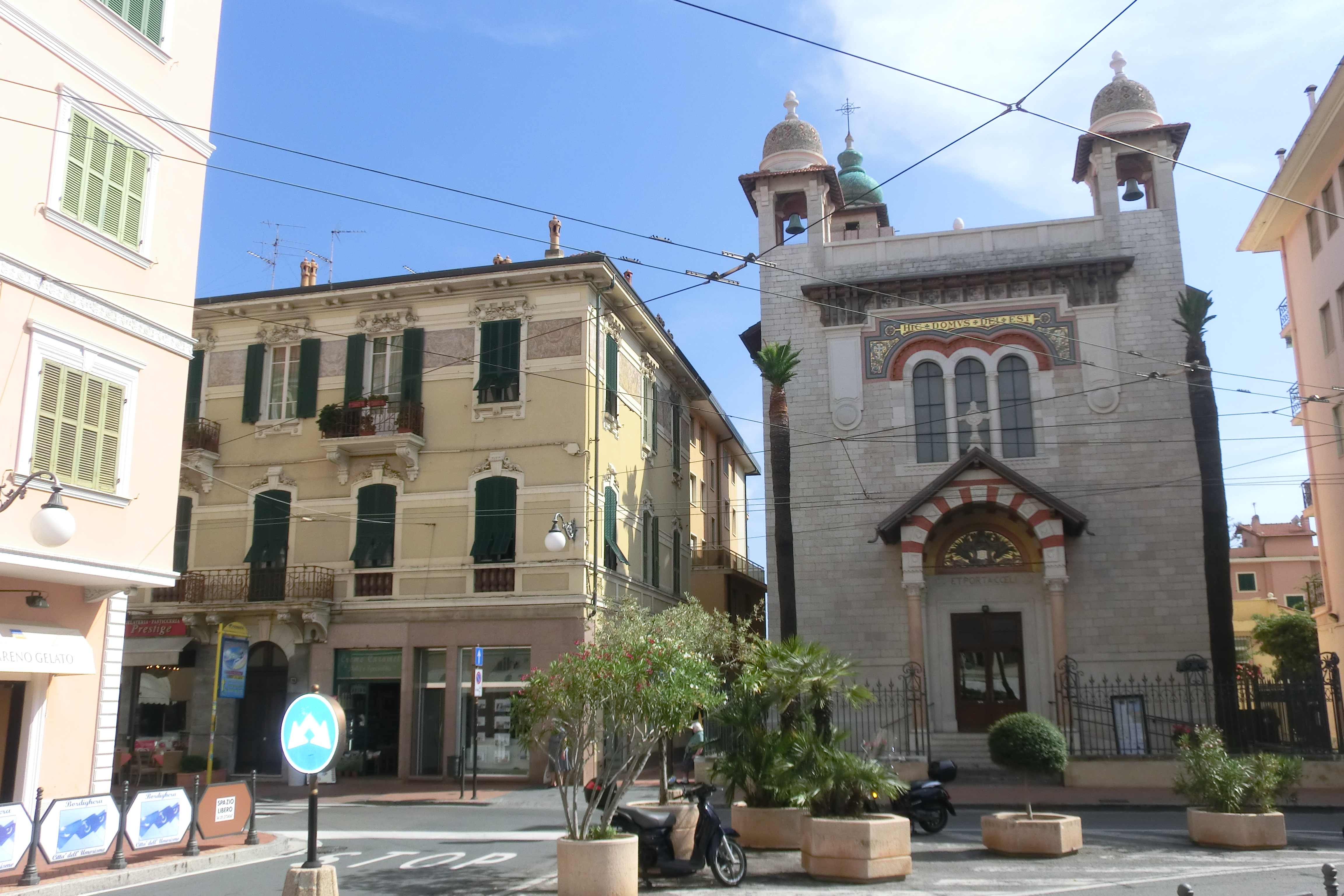 Chiesa dell'Immacolata Concezione o di Terrasanta